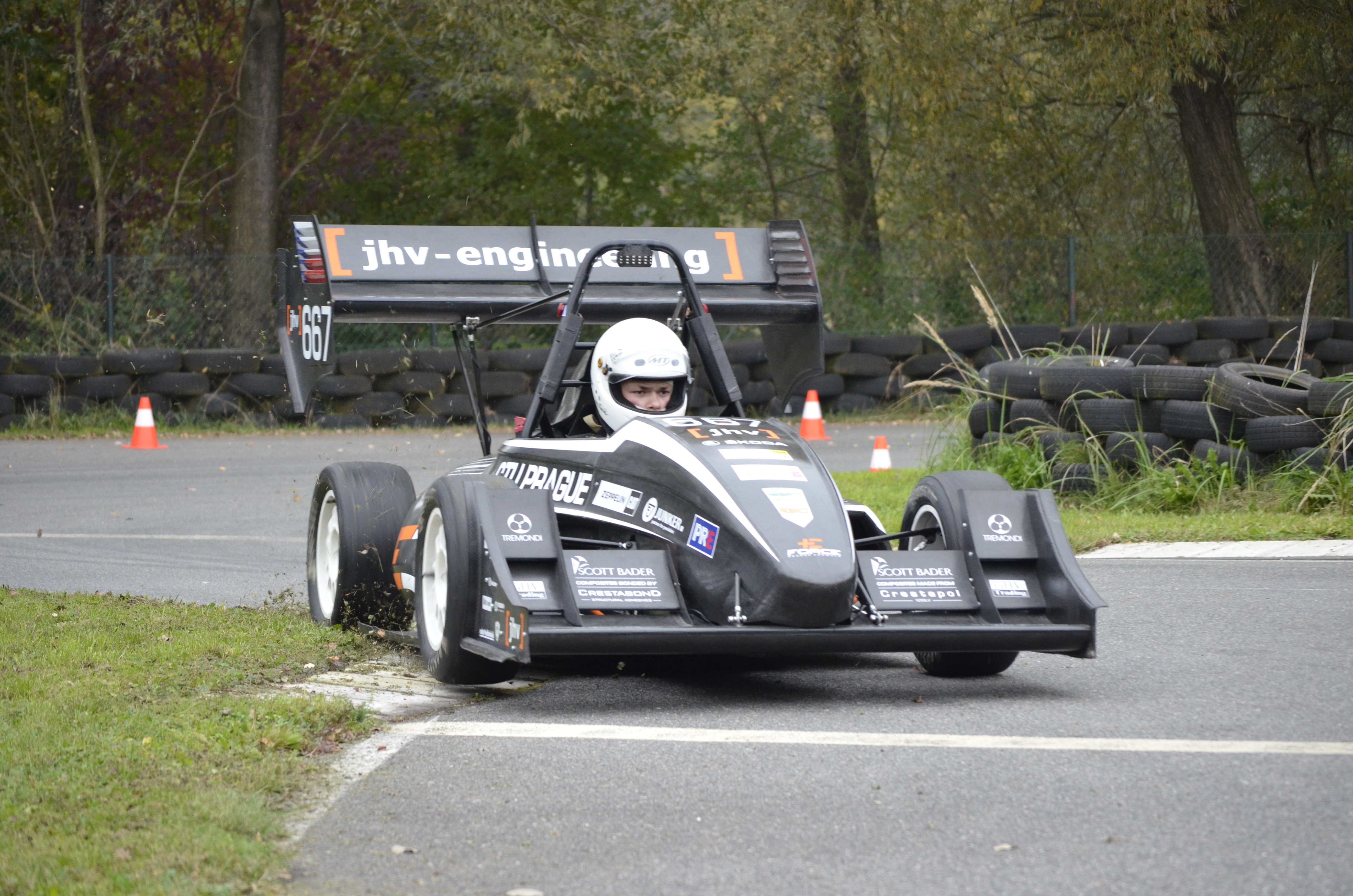 Elektromobil FSE.03 formule Student týmu eForce ČVUT Praha.